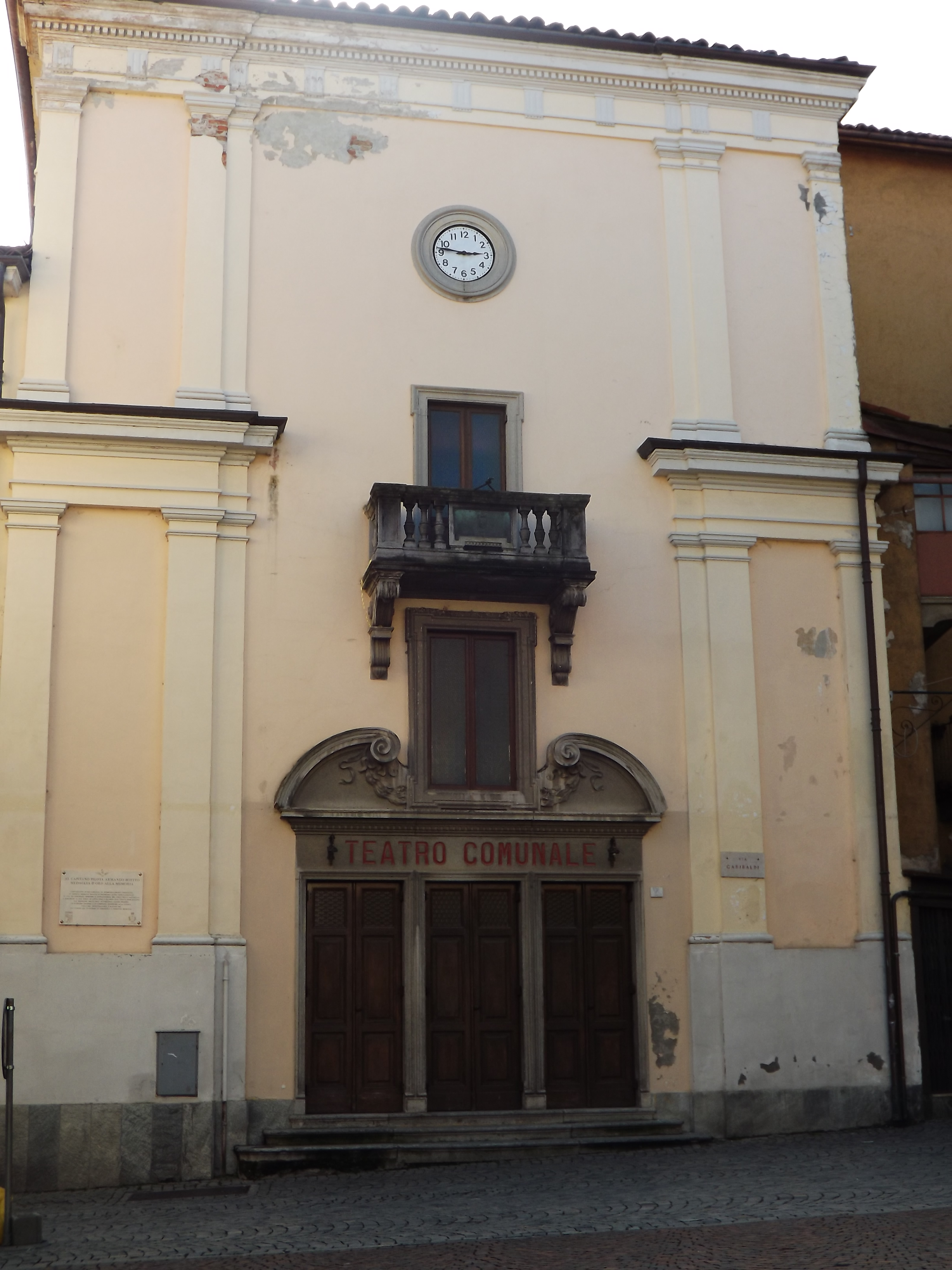 Facciata del Teatro comunale di Cuorgnè